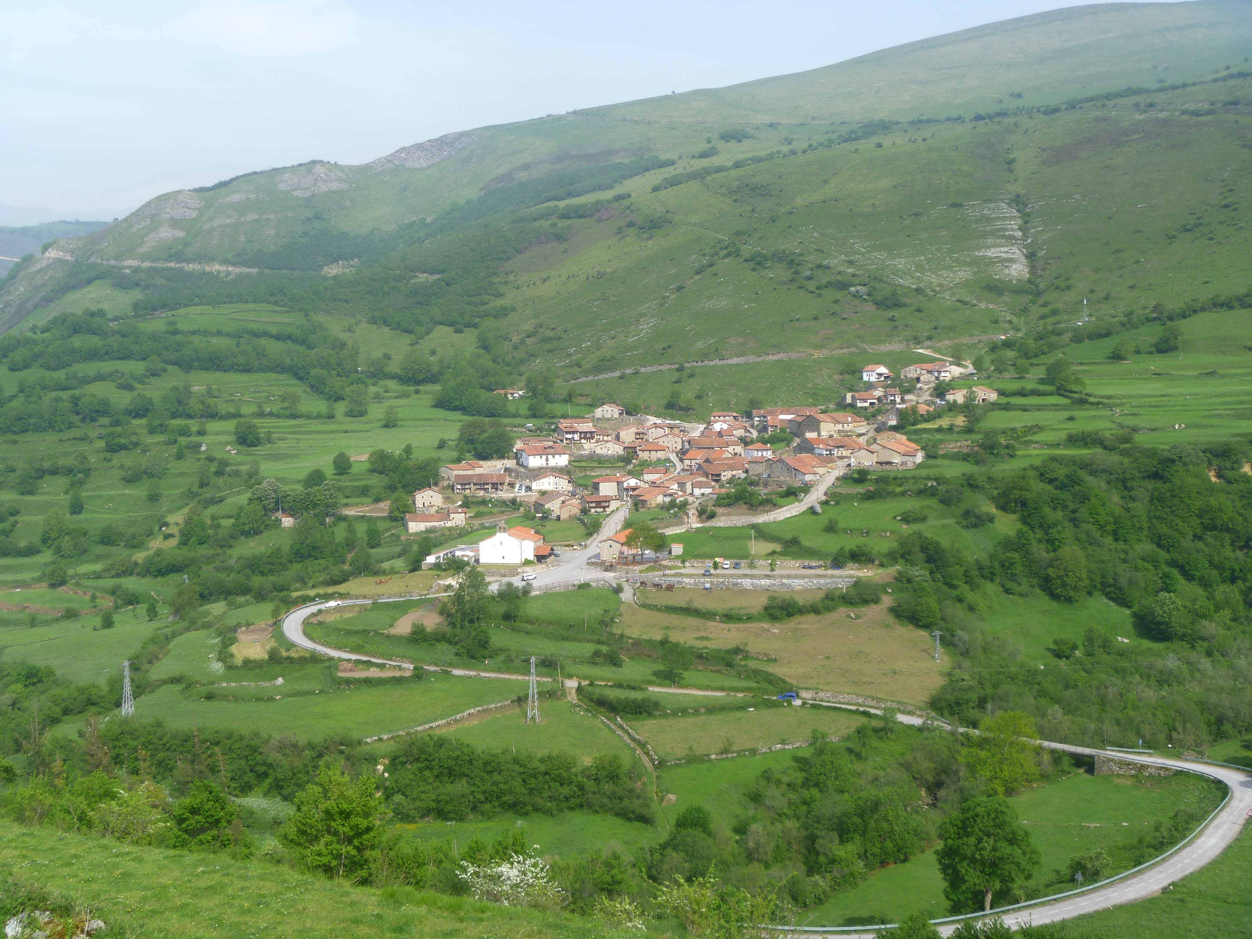 Una vista de Tudanca desde La Lastra. This is a photography of a Site of Community Importance in Spain with the ID: ES1300009. Natura2000 entry, EEA entry